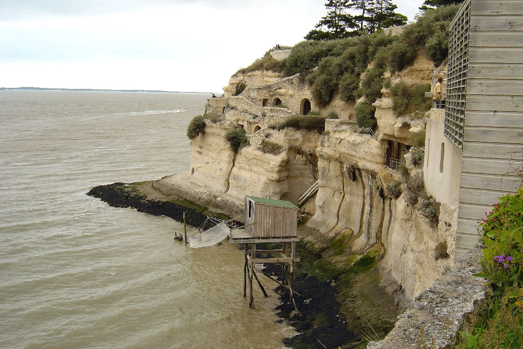 Grottes municipales du Regulus -Meschers sur Gironde.